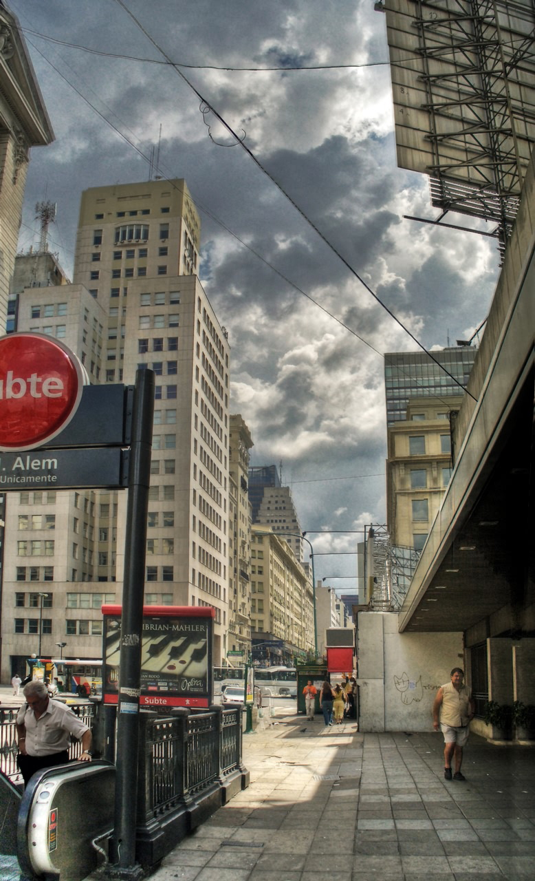 Boca de acceso a la estación Leandro N. Alem del subterráneo porteño sobre la Avenida CorrientesAvenida Corrientes